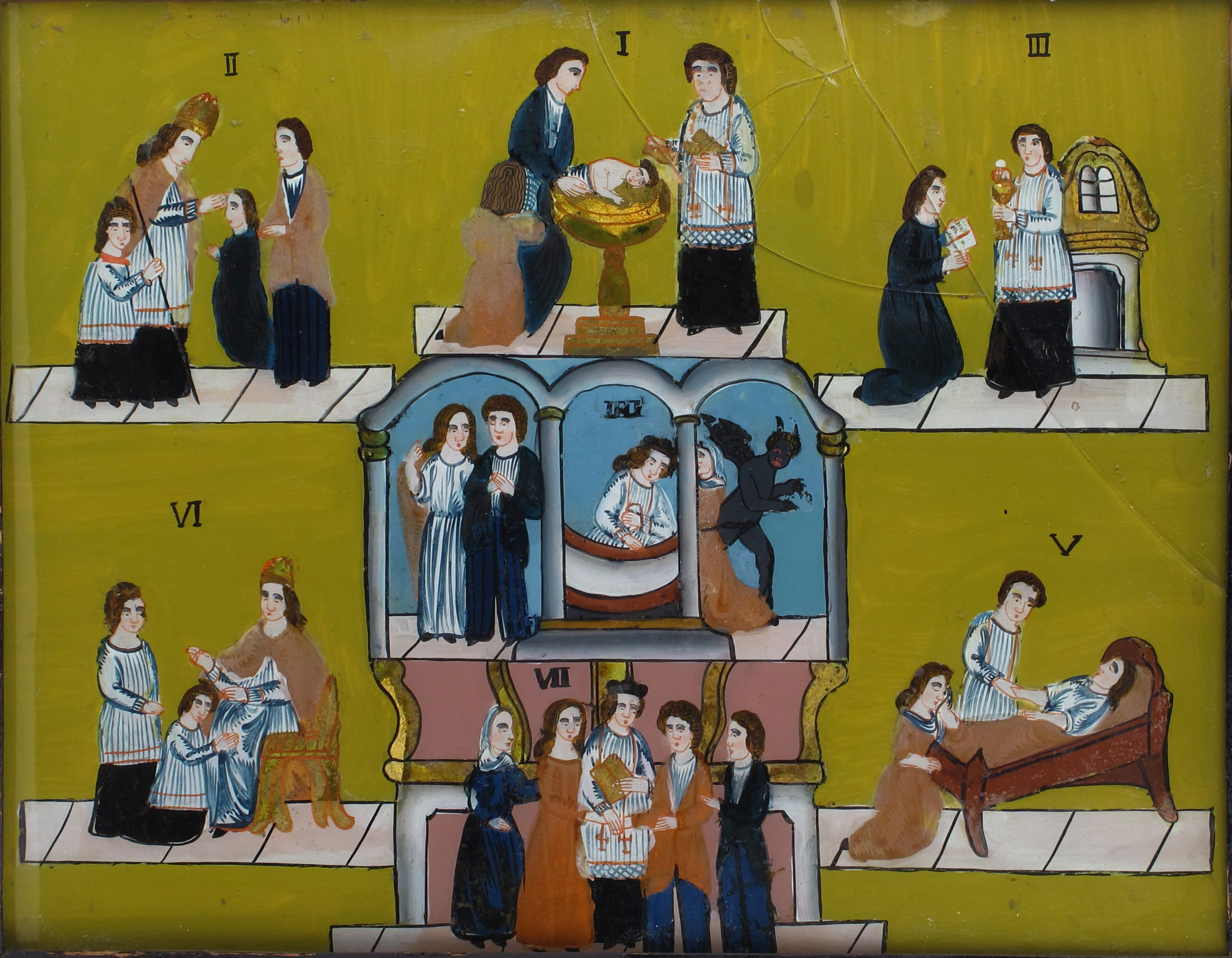 Hinterglasbild "Sieben Sakramente" 37 x 46,5 cm. 19. Jahrhundert.